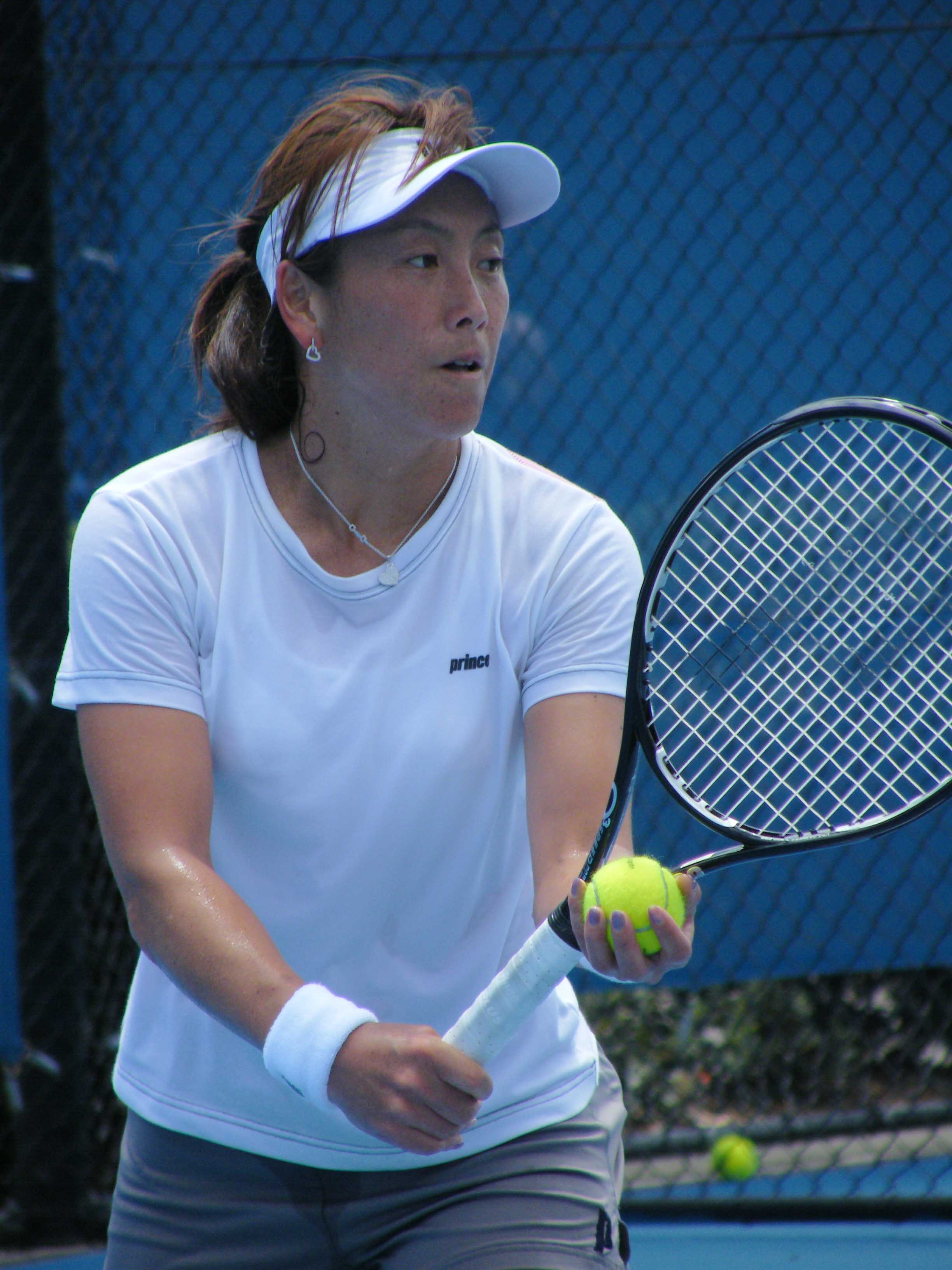 Ai Sugiyama of Japan - NSW Open, January 2009.